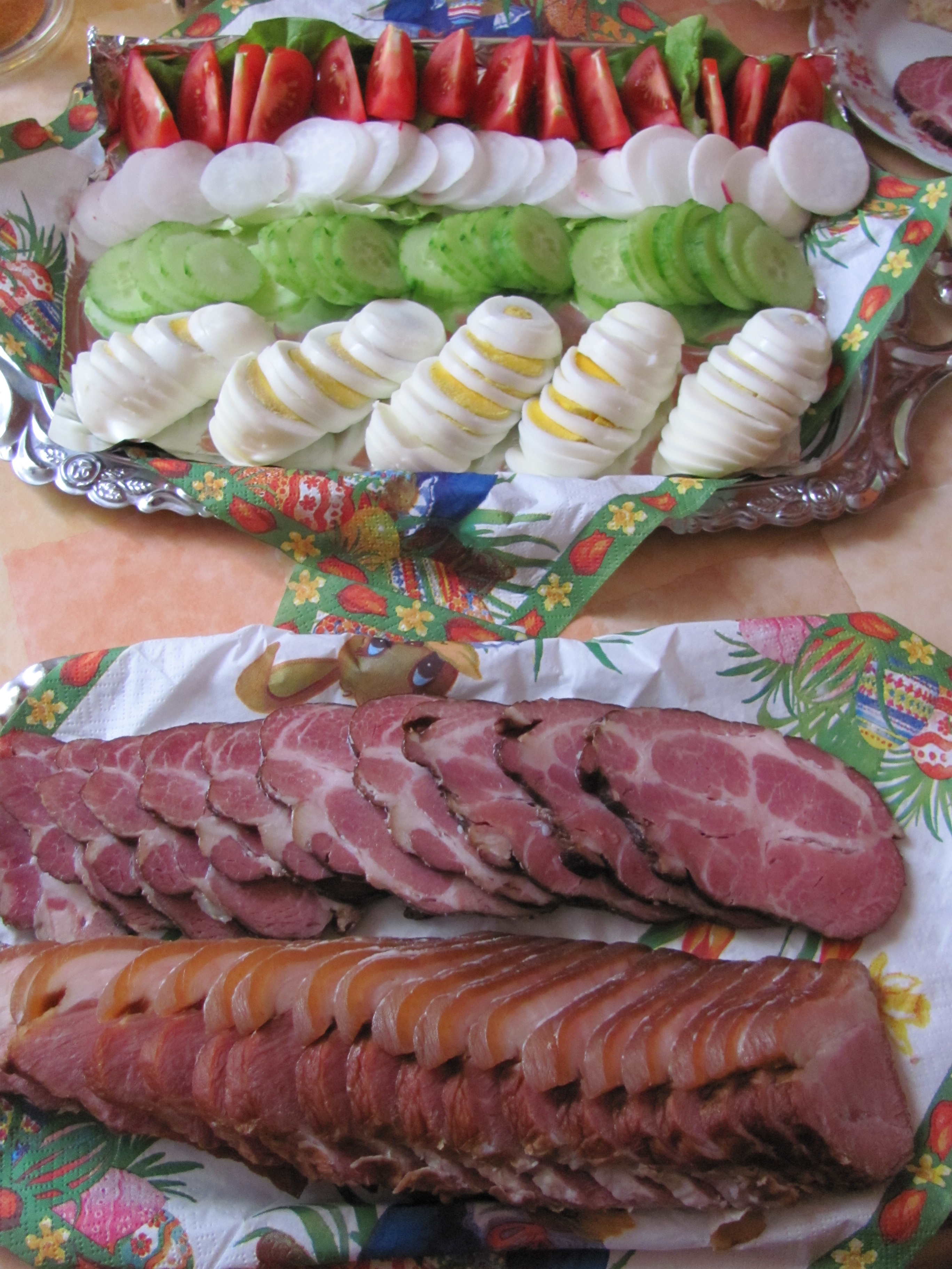 Hagyományos húsvéti reggeli Egerben, Magyarországon